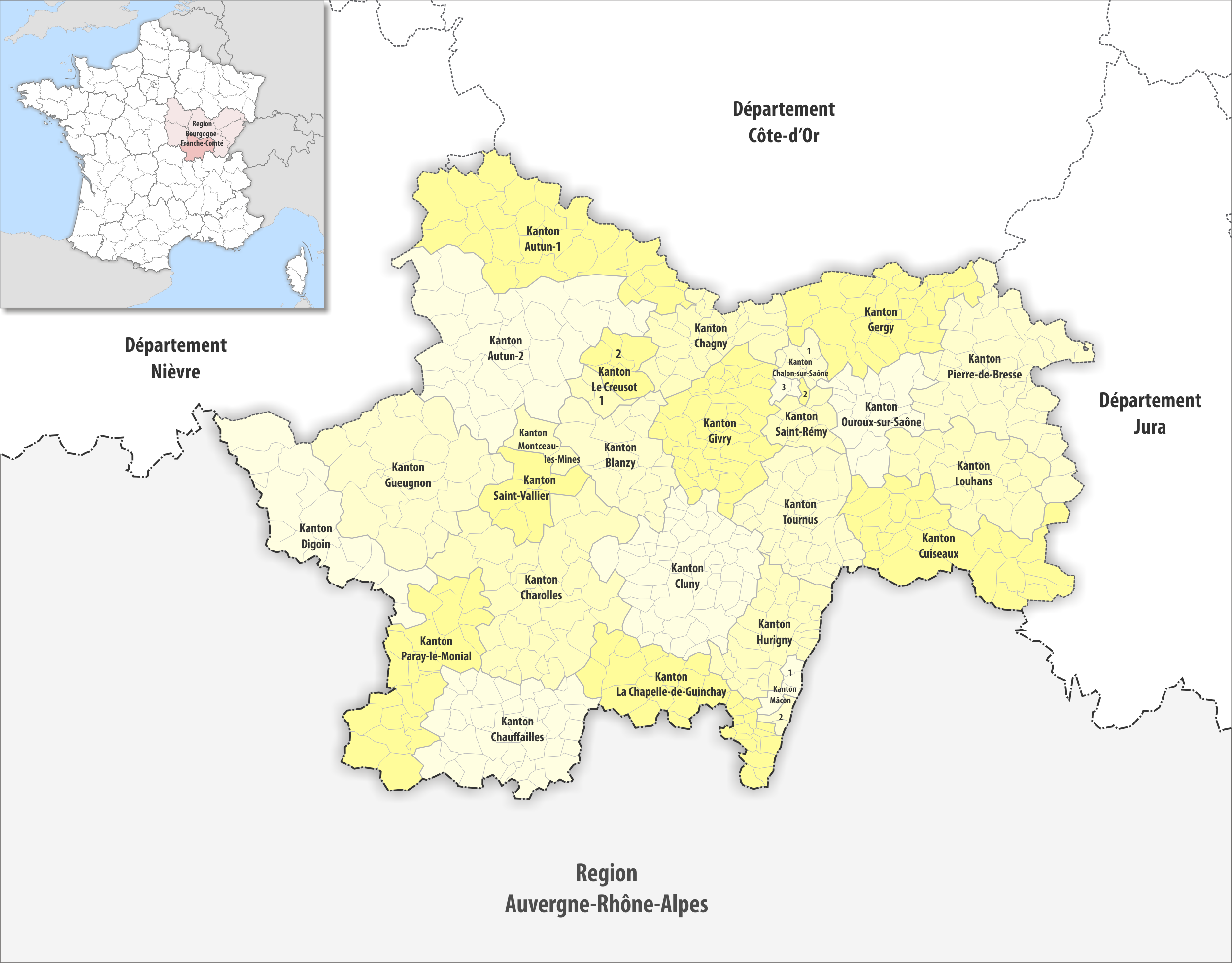 Gemeinden und Kantone im Departement Saône-et-Loire